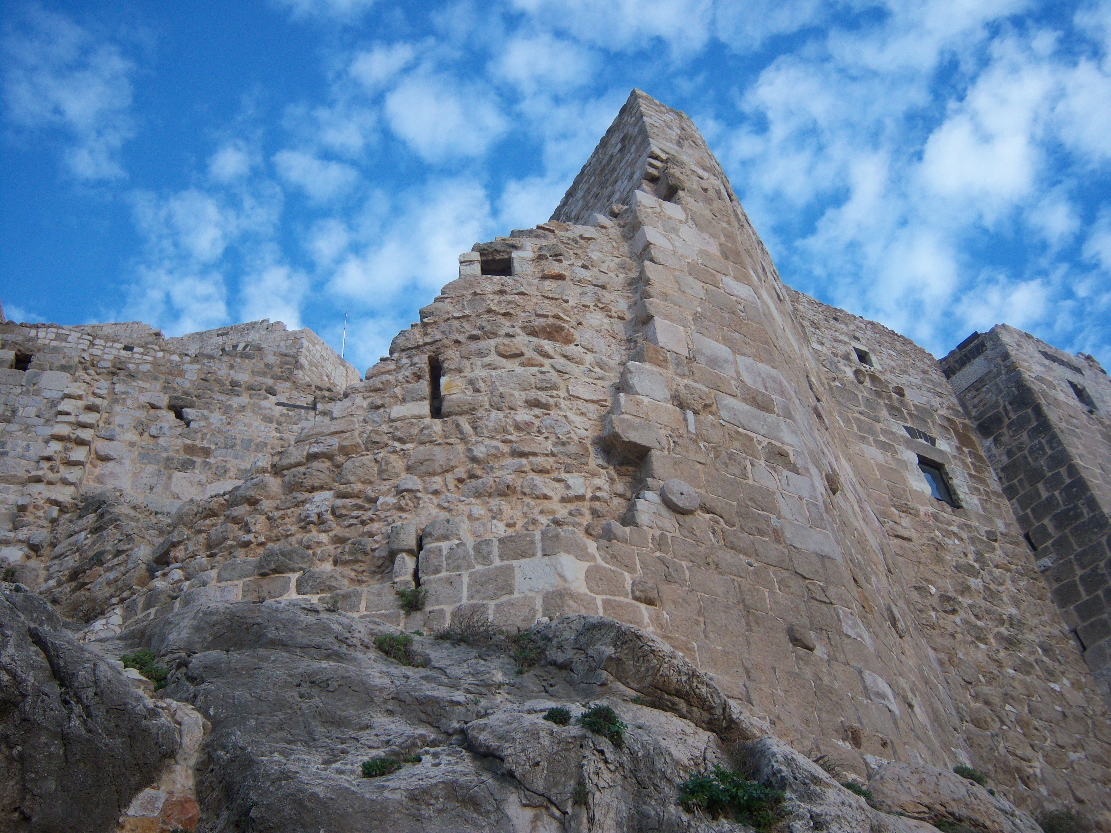 قلعة مصياف من الداخل